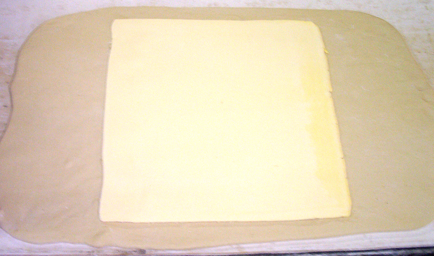 Einlegen der Ziefettpaltte